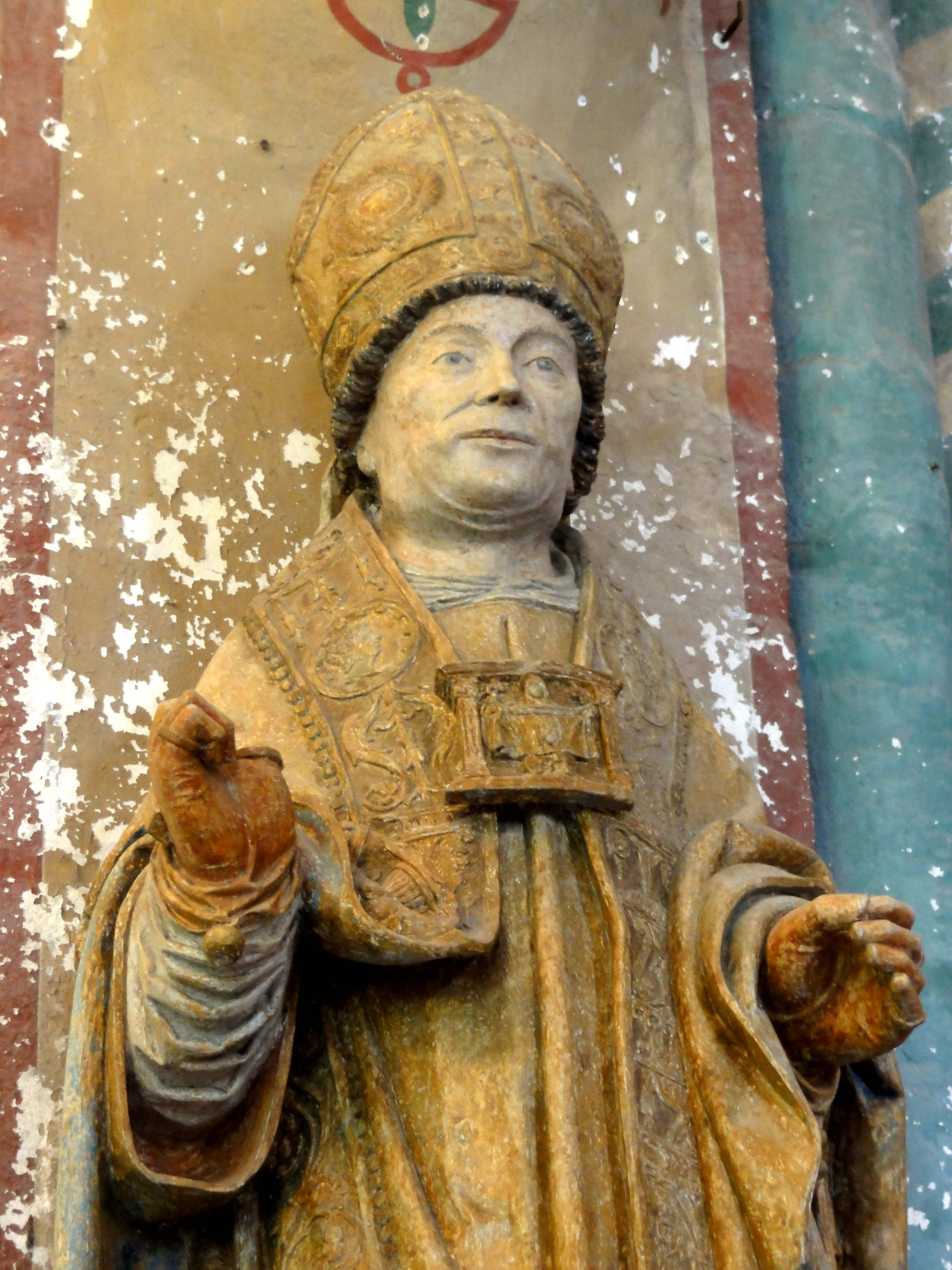 Statue de saint Lô (Laud de Coutances), détail.